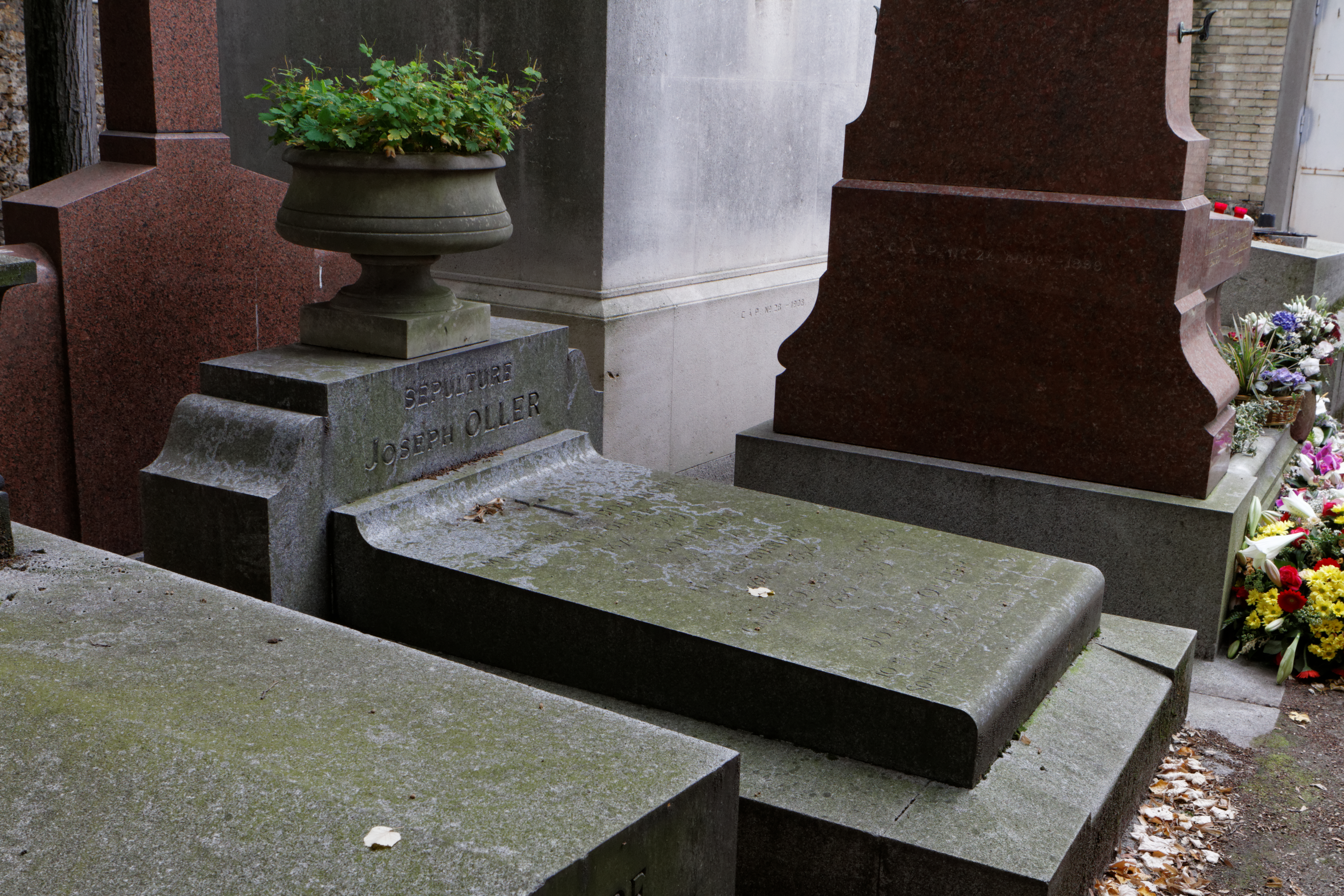 Sépulture de Joseph Oller (1839-1922), co-créateur du Moulin Rouge et fondateur du paris mutuel ; et de son épouse Carmen Oller née Coello (1830-1919).